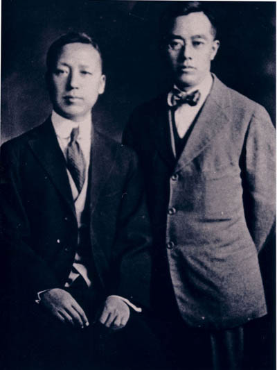 Syngman Rhee and Kim Kyu-shik in Shanghai